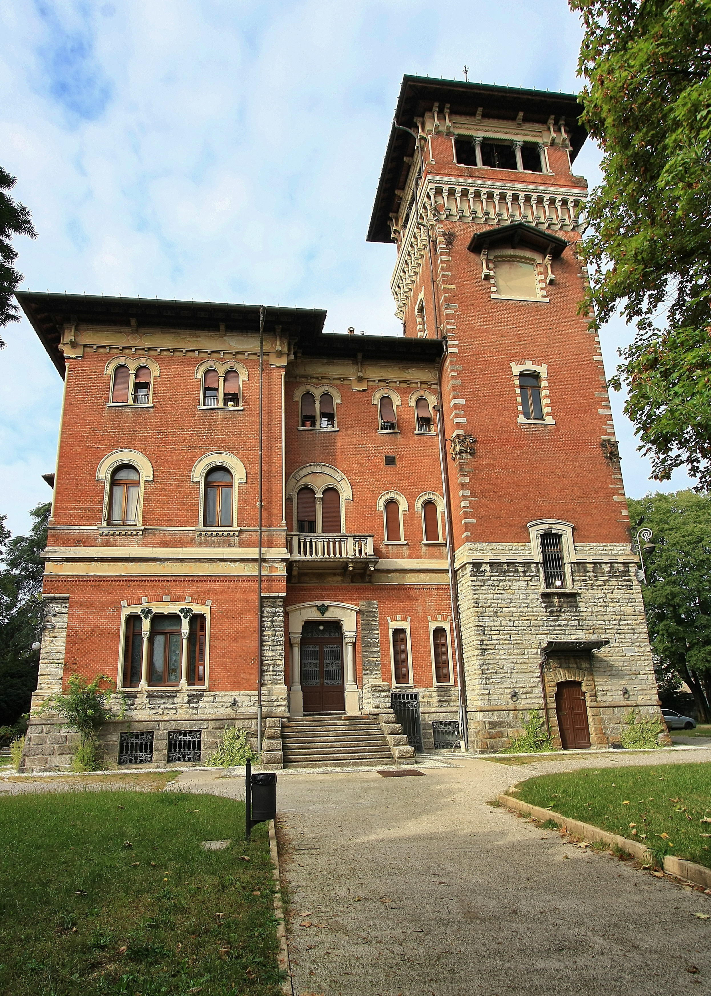 Villa Ottolini-Tosi This is a photo of a monument which is part of cultural heritage of Italy.